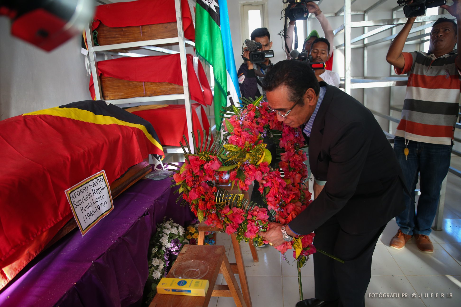 Präsident Guterres legt Blumen für Afonso Sávio nieder, im Beinhaus von Raça.